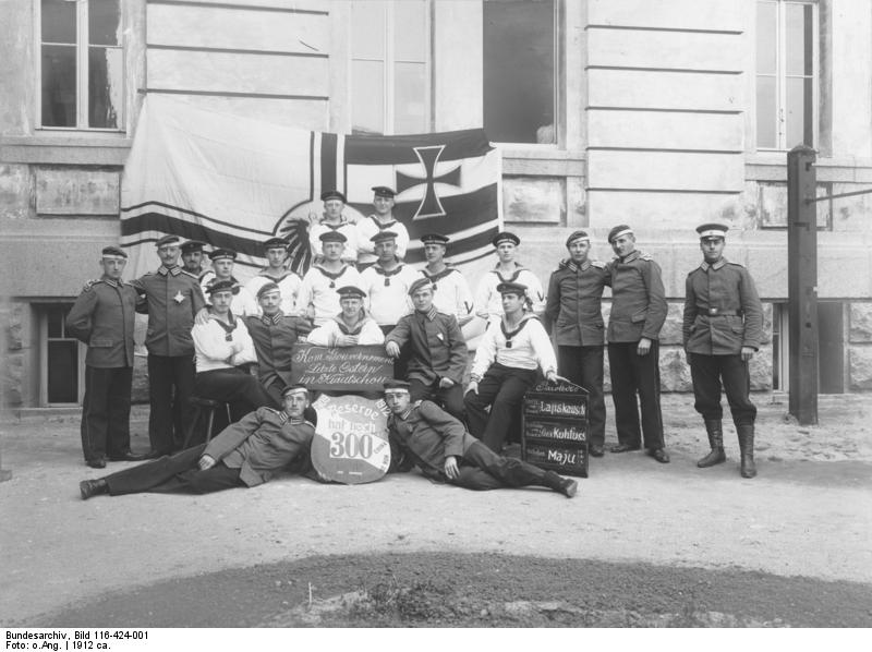 China, Tsingtau Kom. Gouvernement - Letzte Ostern in Kiautschou Reserve hat noch 300 Täglein; 1909 - 1912 Foto um 1912 UBz: 4. Reihe: Stölting, Fein, 3.Reihe -mitte-: Urbach, Rosenkranz, Junge, Fräse, Kuklan, Neugebauer, Heim 3.Reihe aussen r.+l.:Bergmann, Rink, Hasselmann, Bornemann 2.Reihe v. vorn: Quinten, Hirsch, Held, Schmidt, Mengel, - ganz außen- Drescher 1.Reihe v. vorn: Illgen, Bobländer